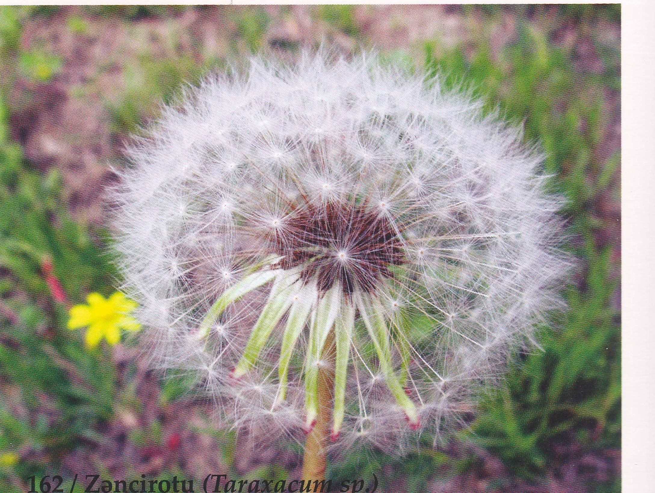 Saatlı zəncir otu